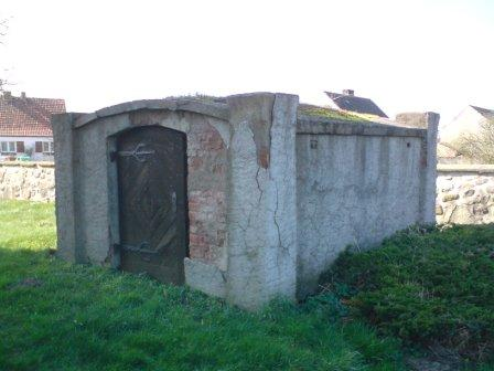 Die Zigeunergruft steht am östlichen Friedhofsrand zwischen Mauer und Turm.